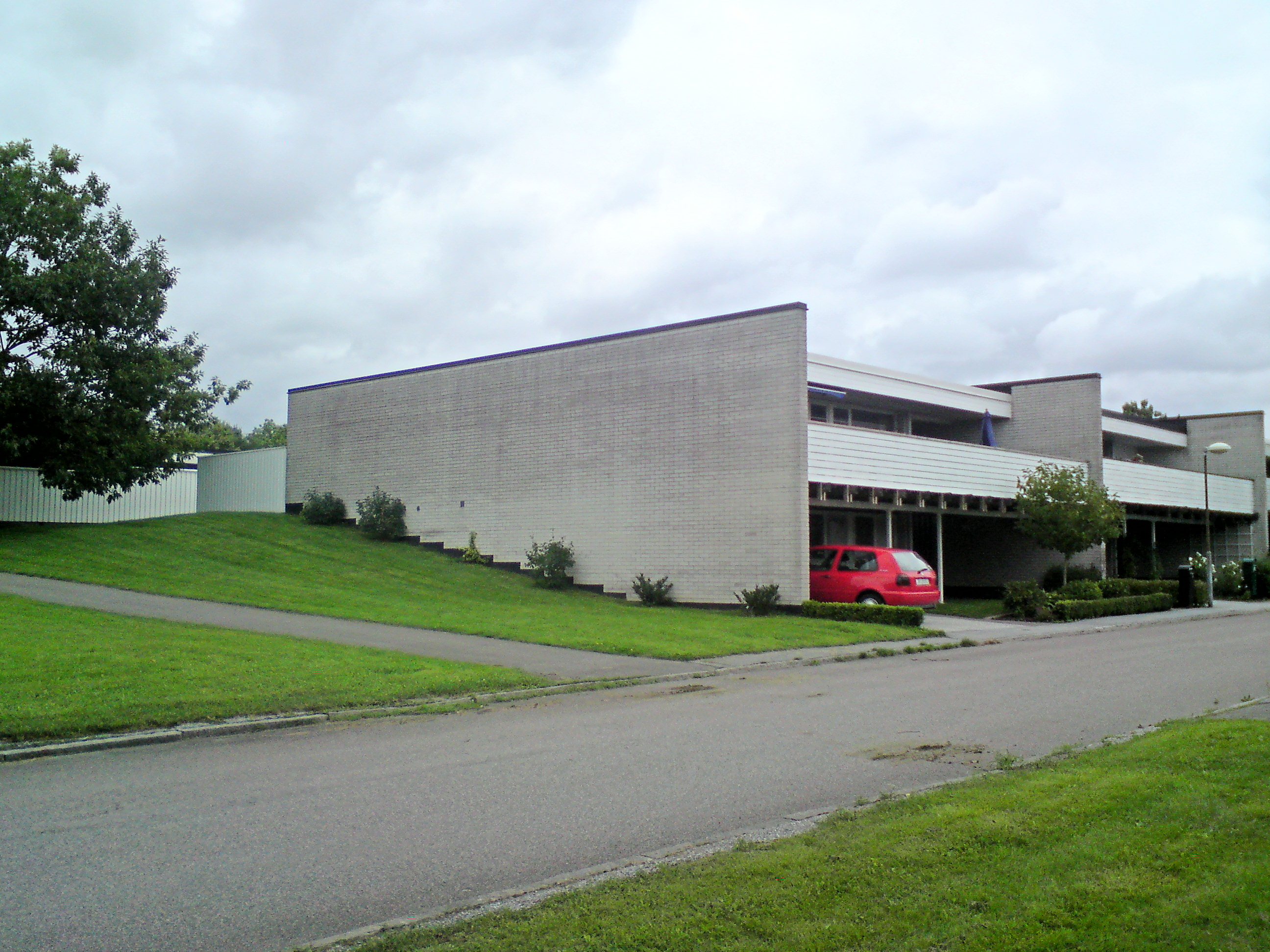 Suterrängradhus i Lund